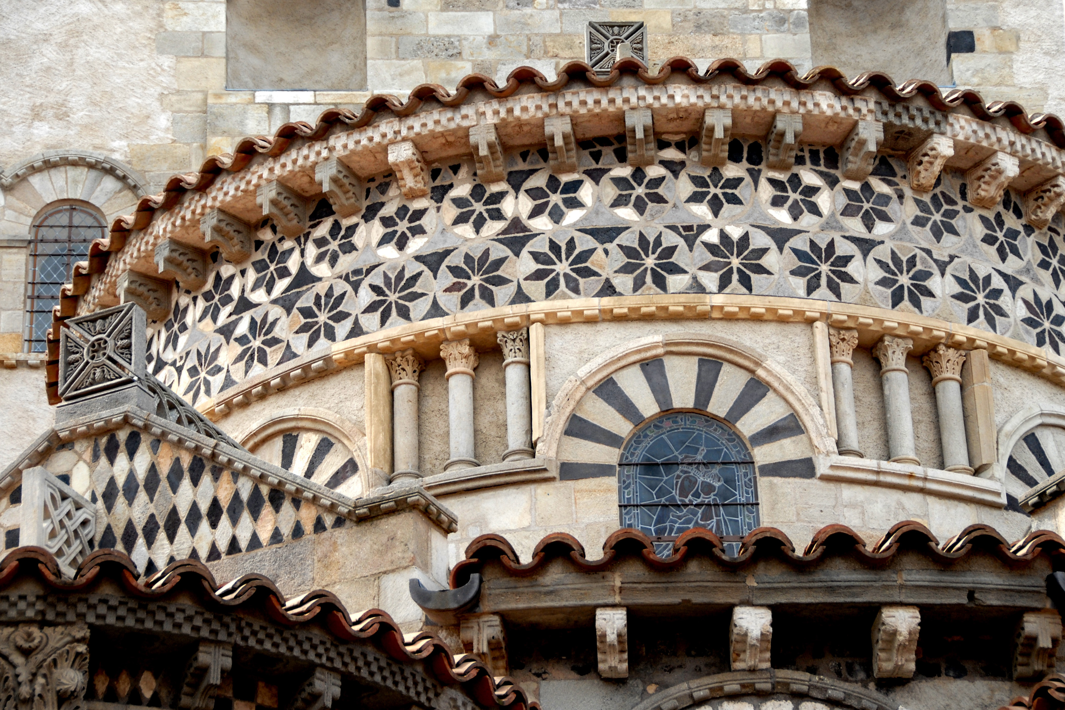 Notre-Dame du Port, Chorapsis